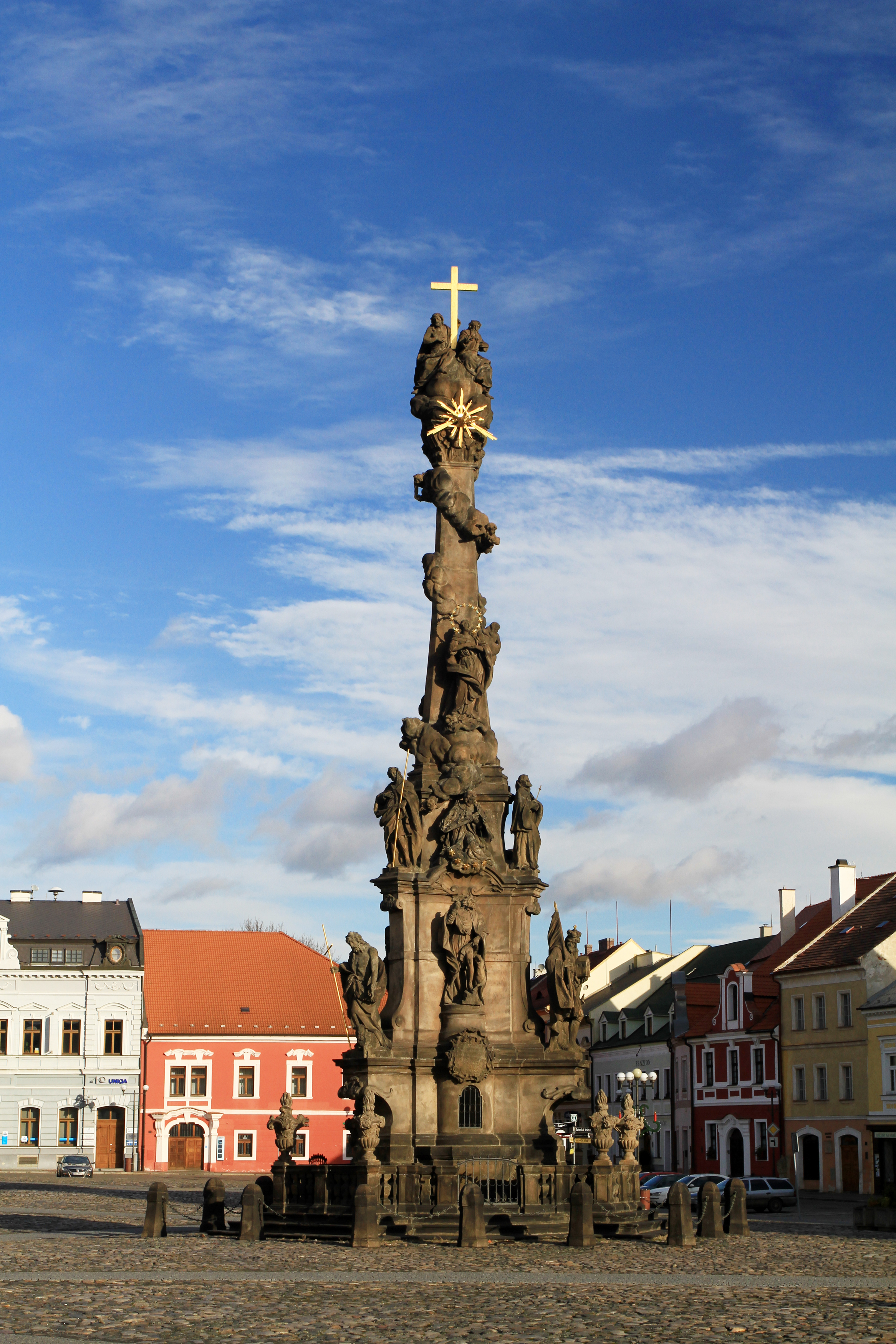 Sloup se sousoším Nejsvětější Trojice, Mírové náměstí, Kadaň.